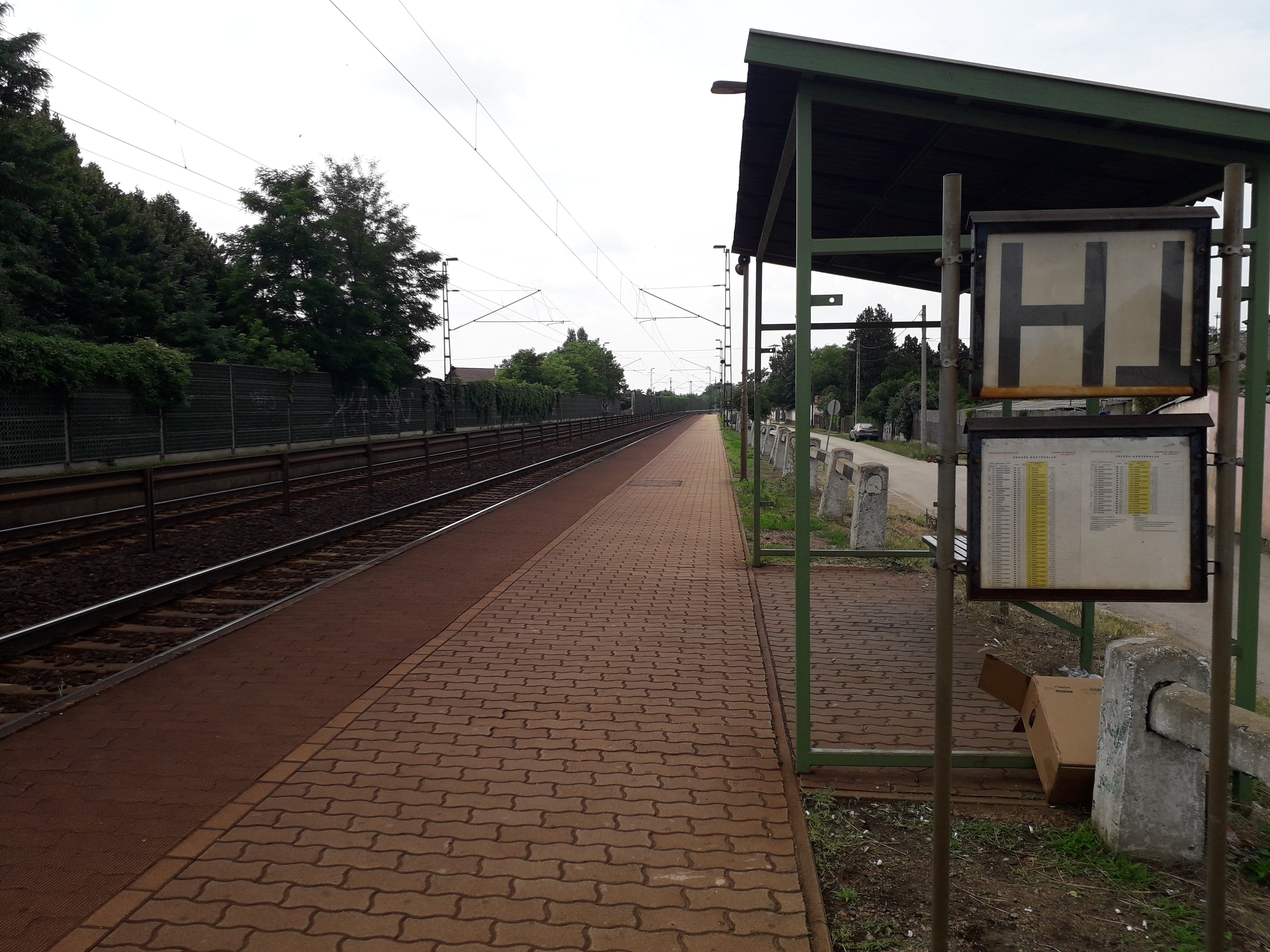 Vecsés-Kertekalja